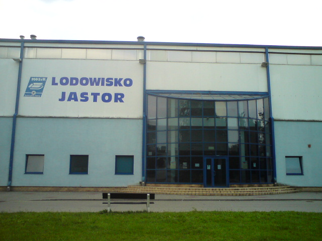 Zimní stadion Jastor